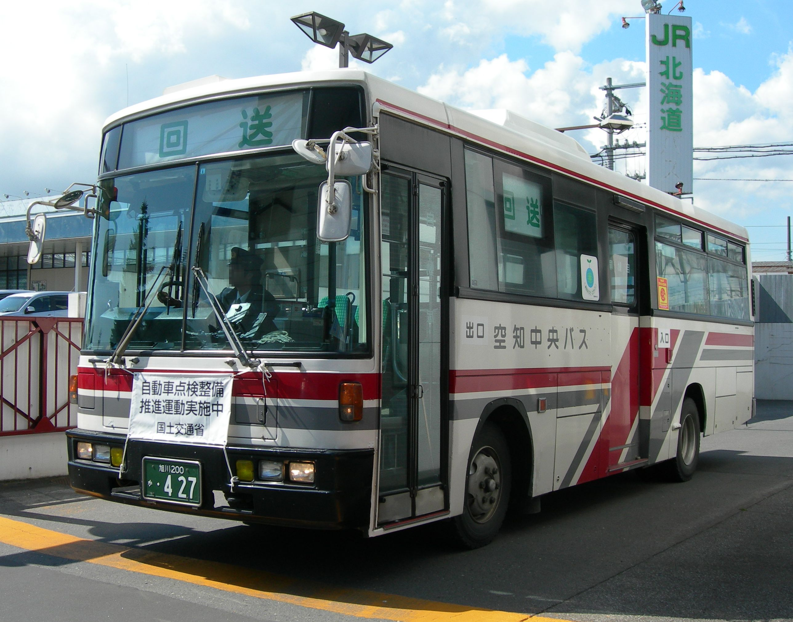 Sorachi Chūō Bus car 空知中央バス 路線バス